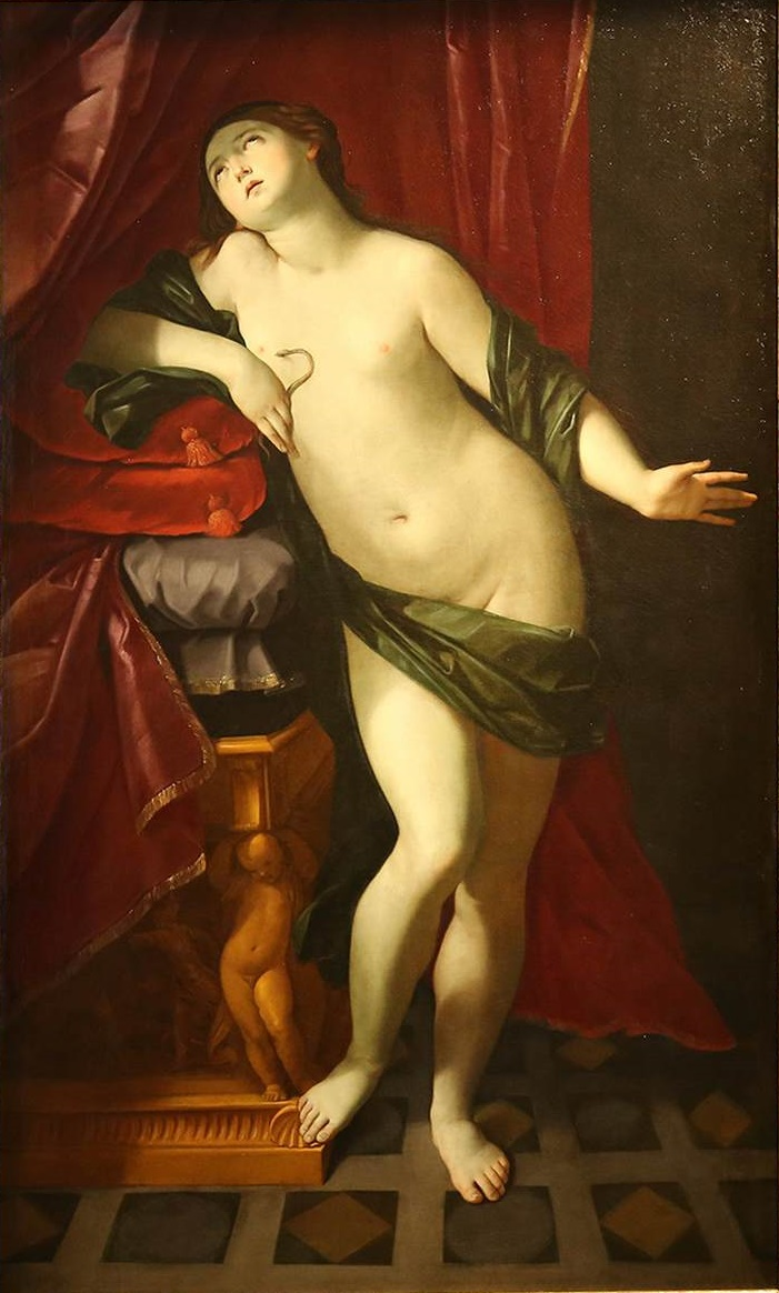 Cleopatra